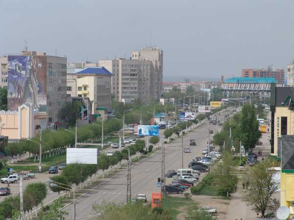 Проспект Абилкайыр хана (Актобе, Казахстан).